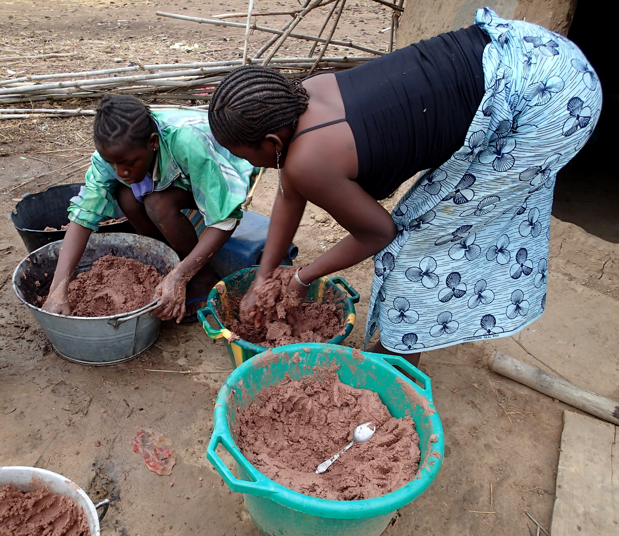 Préparation du beurre de karité, par deux adolescentes, dans le village de Badala, région de Kayes, au Mali This is an image of food from Mali